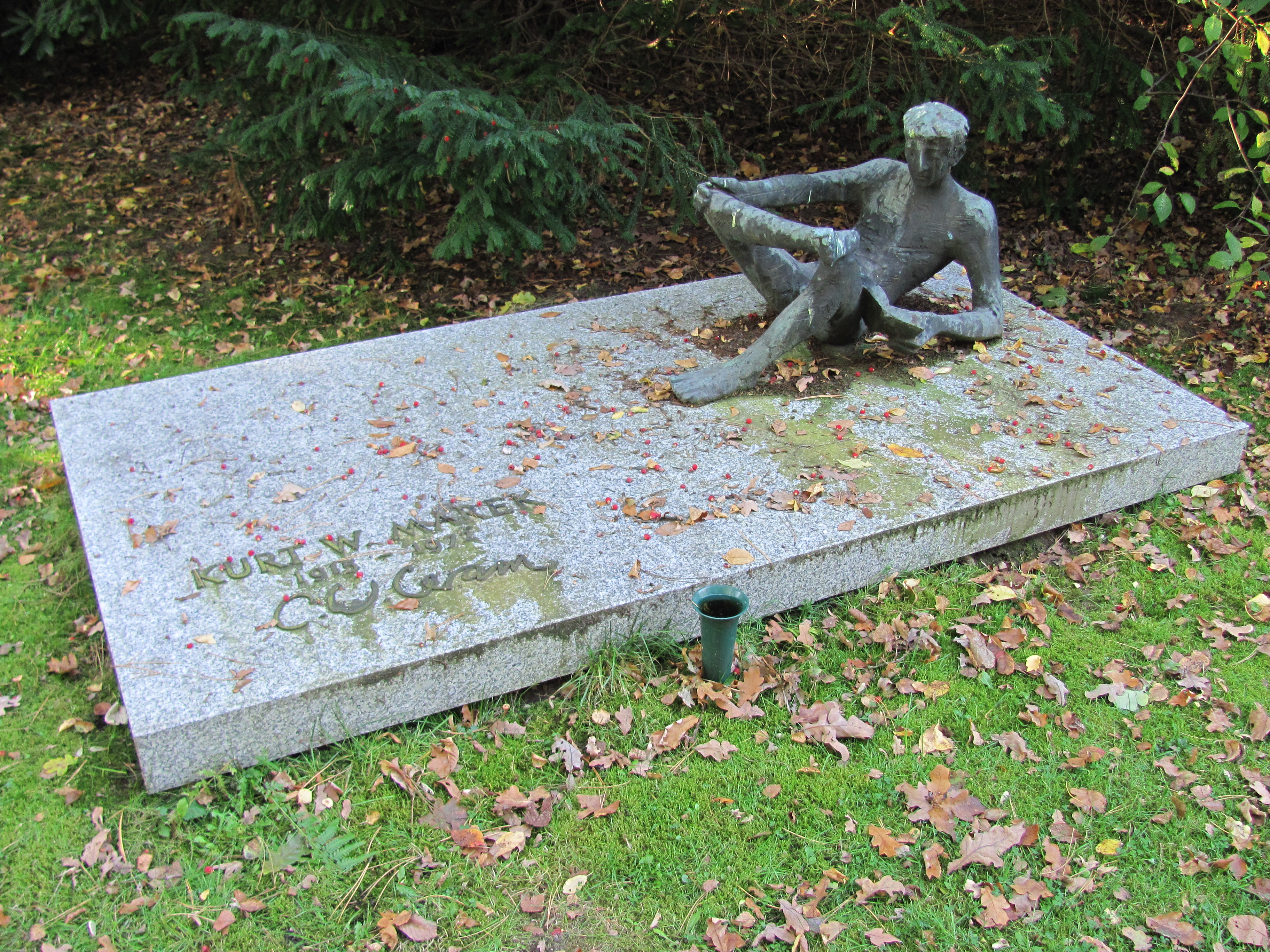 Grabstätte von C. W. Ceram auf dem Ohlsdorfer Friedhof, Hamburg. Die Skulptur wurde 1972 vom deutschen Bildhauer Erich Fritz Reuter geschaffen.